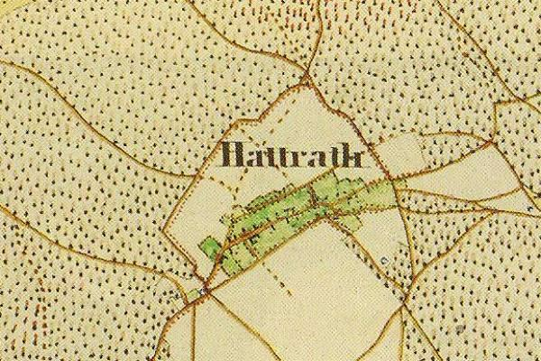 Preußische Kartenaufnahme 1846 - Uraufnahme - (5002 Geilenkirchen)